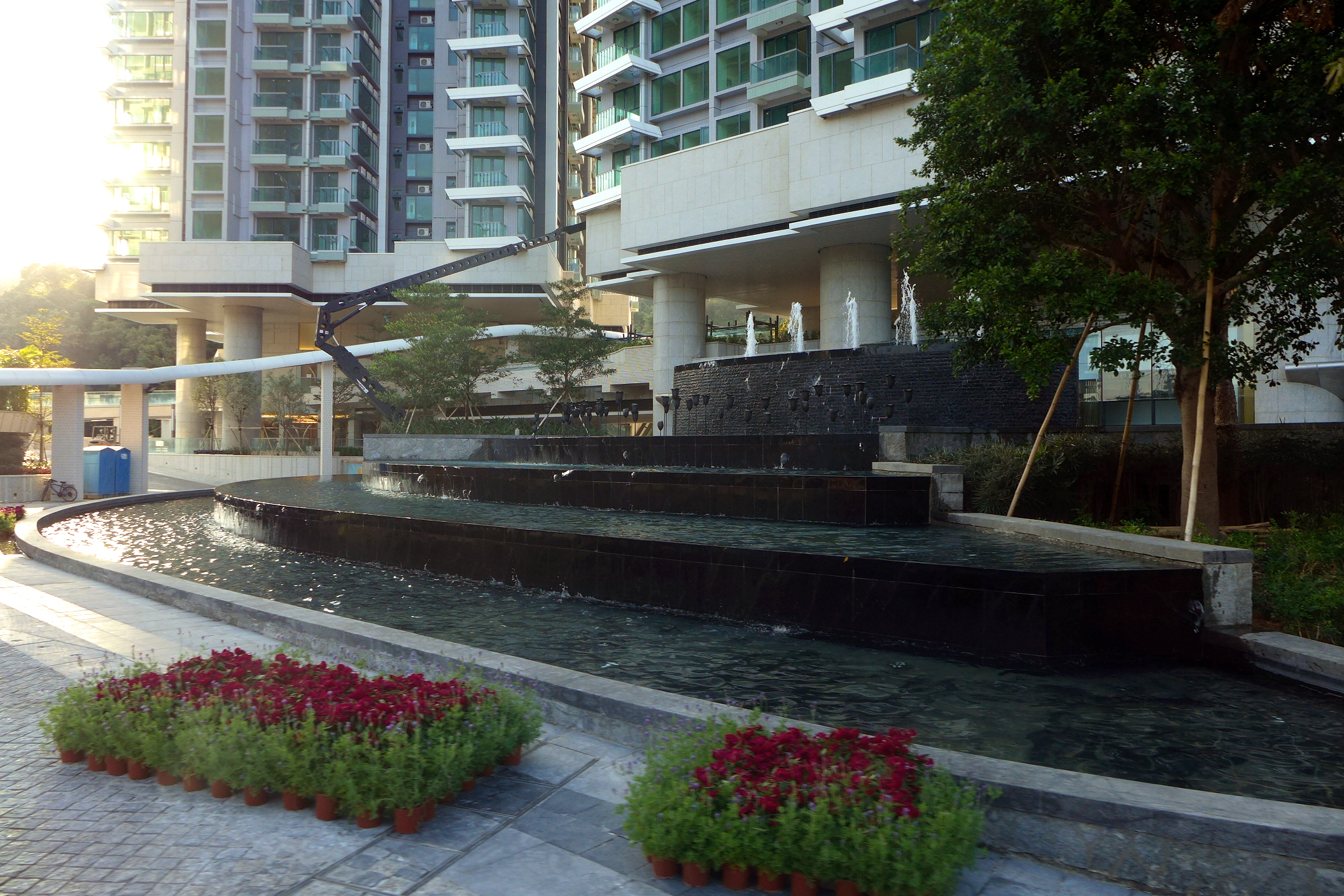 Mont Vert, Tai Po